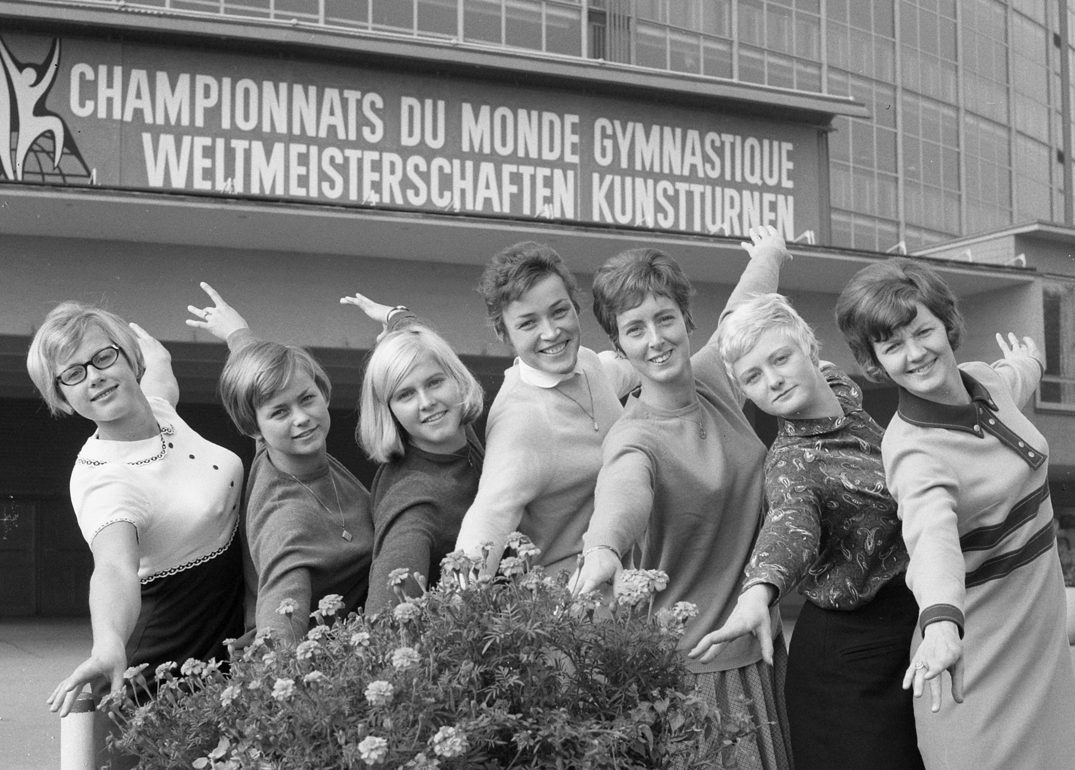 Wereldkampioenschappen turnen 1966 in Dortmund. De Nederlandse turnsters, v.l.n.r. Heerschop, Klees, Kroes, Van Essen, Rietveld, Klunder en Belmer